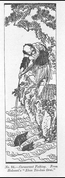 鵜飼．北斎の”絵本庭訓往来”より